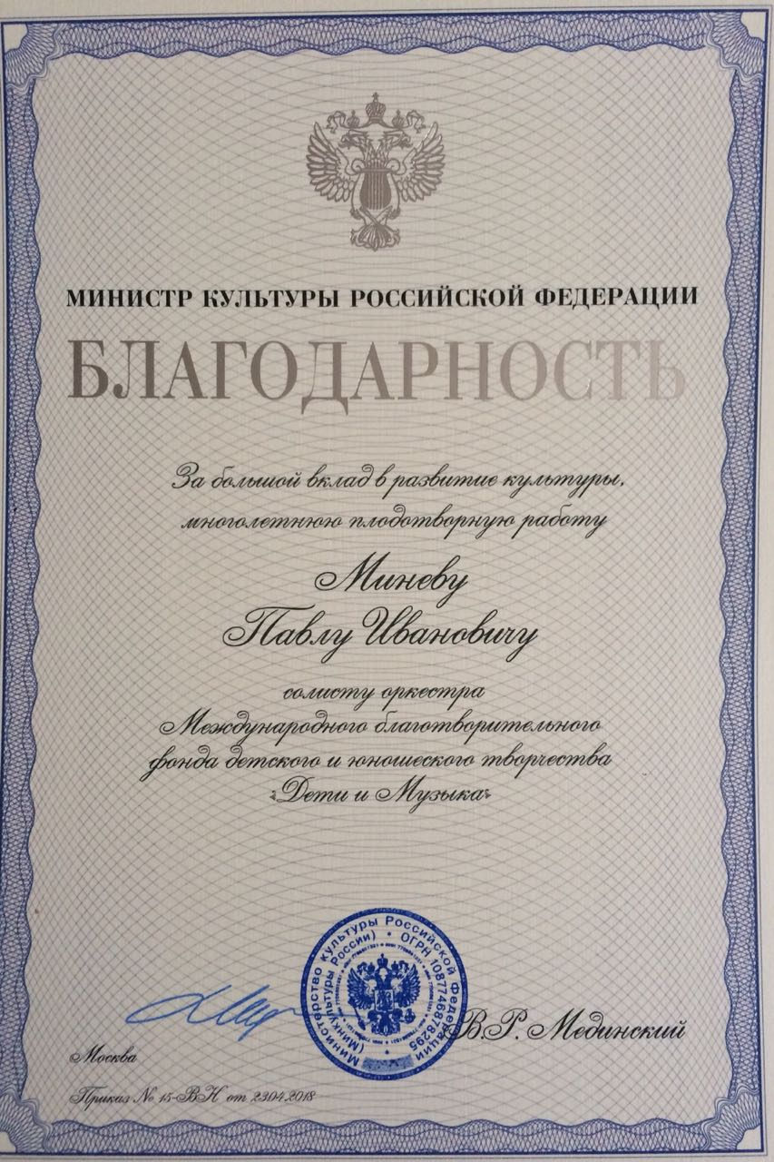 благодарность